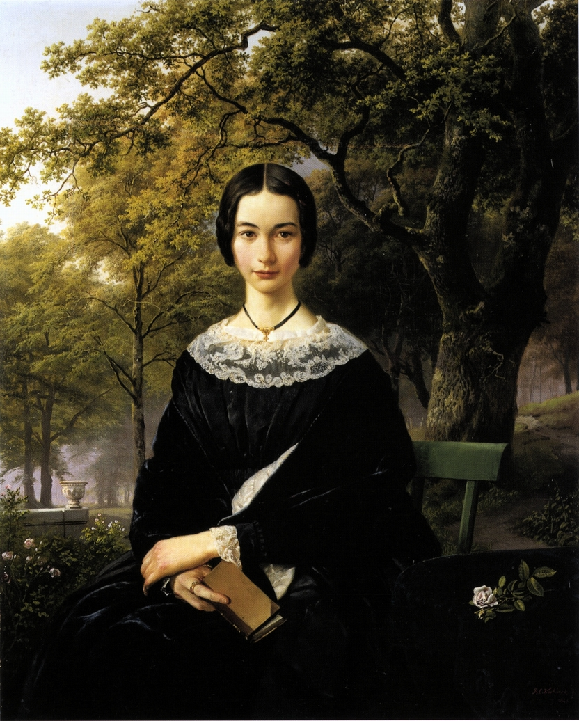 Barend Cornelis Koekkoek: Bildnis einer jungen Dame, 1846